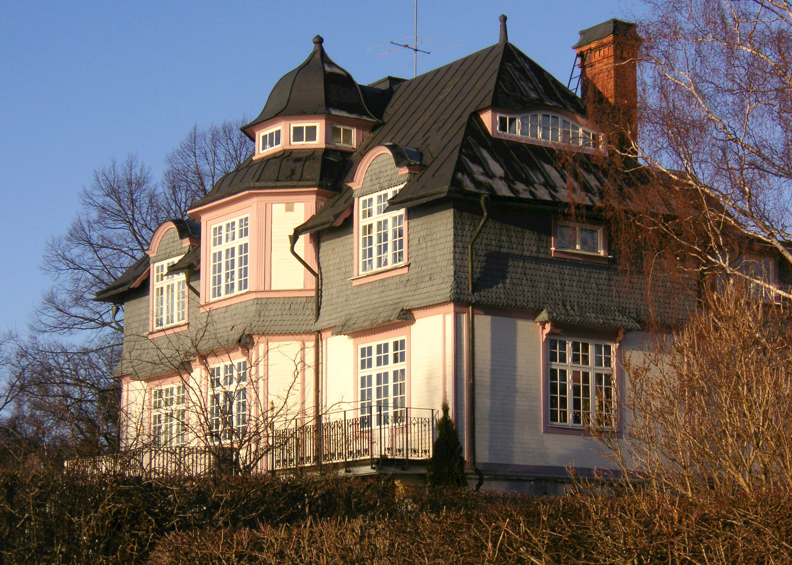 Djursholm, Strandvägen 11, arkitekt Hjalmar Andersson (1871-1927)